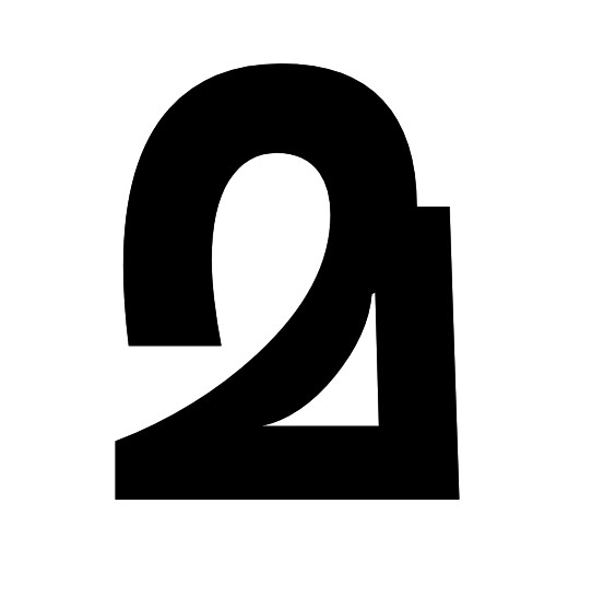 മ മലയാളം അക്ഷരം